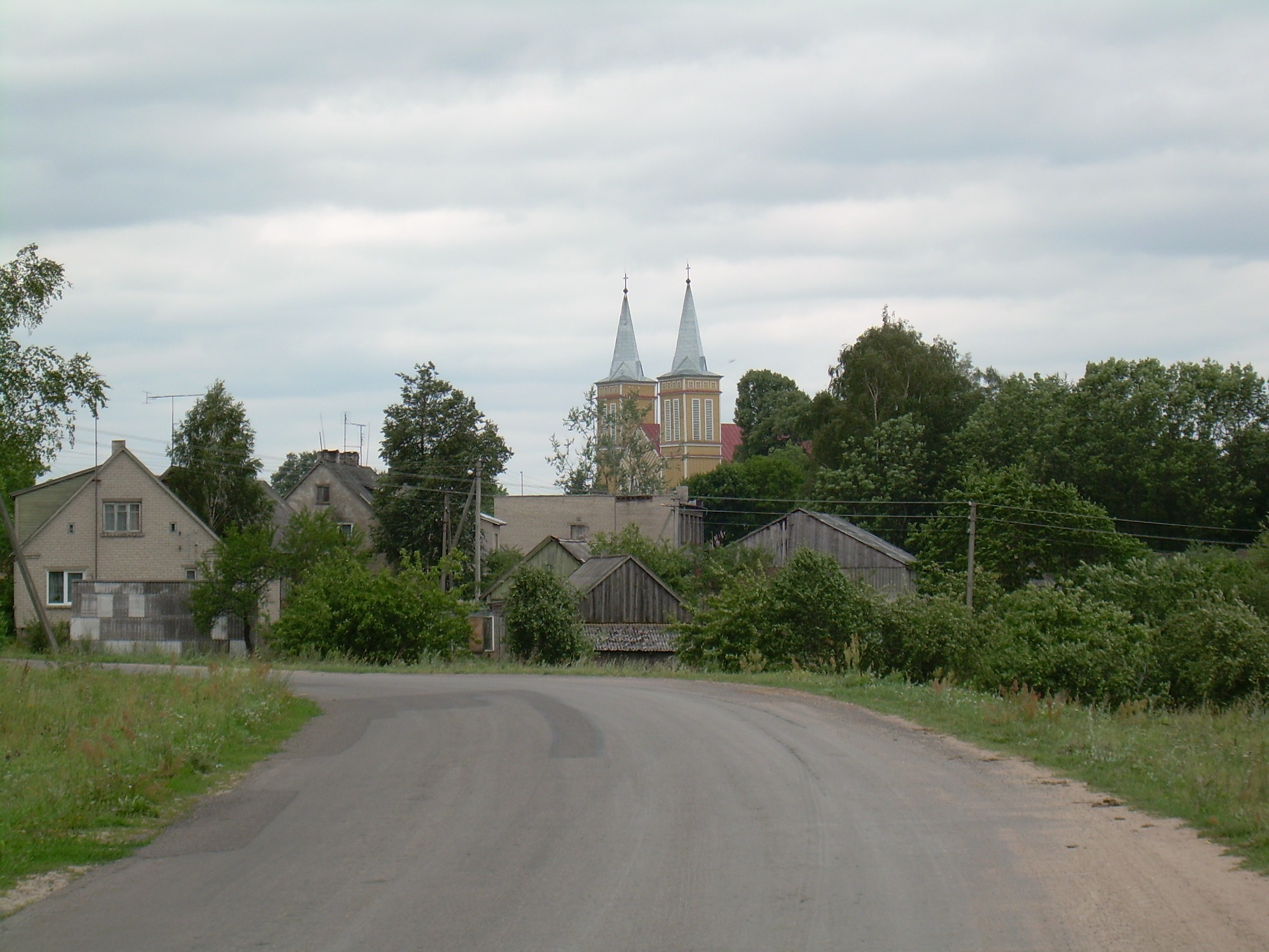 Žarėnų Šv. vyskupo Stanislovo bažnyčia